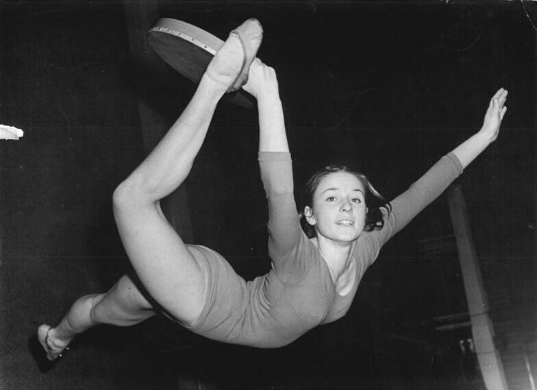 Christa Töpfer Zentralbild Kohls 15.12.1963 Gymnastikparade 1963. Die 4. Meisterschaften der künstlerischen Gymnastik der SV Dynamo fanden am 14. und 15. Dezember 1963 in der Berliner Dynamo-Sporthalle statt. In der Meister-, Jugend- und Leistungsklasse wurden die Sieger in der Einzel- und Gruppengymnastik ermittelt. UBz: Die Siegerin in der Einzelgymnastik der Meisterklasse der Frauen (Fünfkampf) Christa Töpfer (SG Dynamo Hohenschönhausen) während ihrer Kürübung mit Gerät.